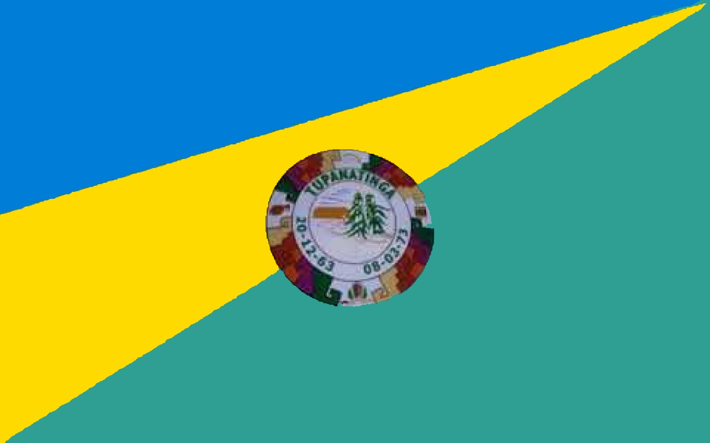 Bandeira da Cidade de Tupanatinga